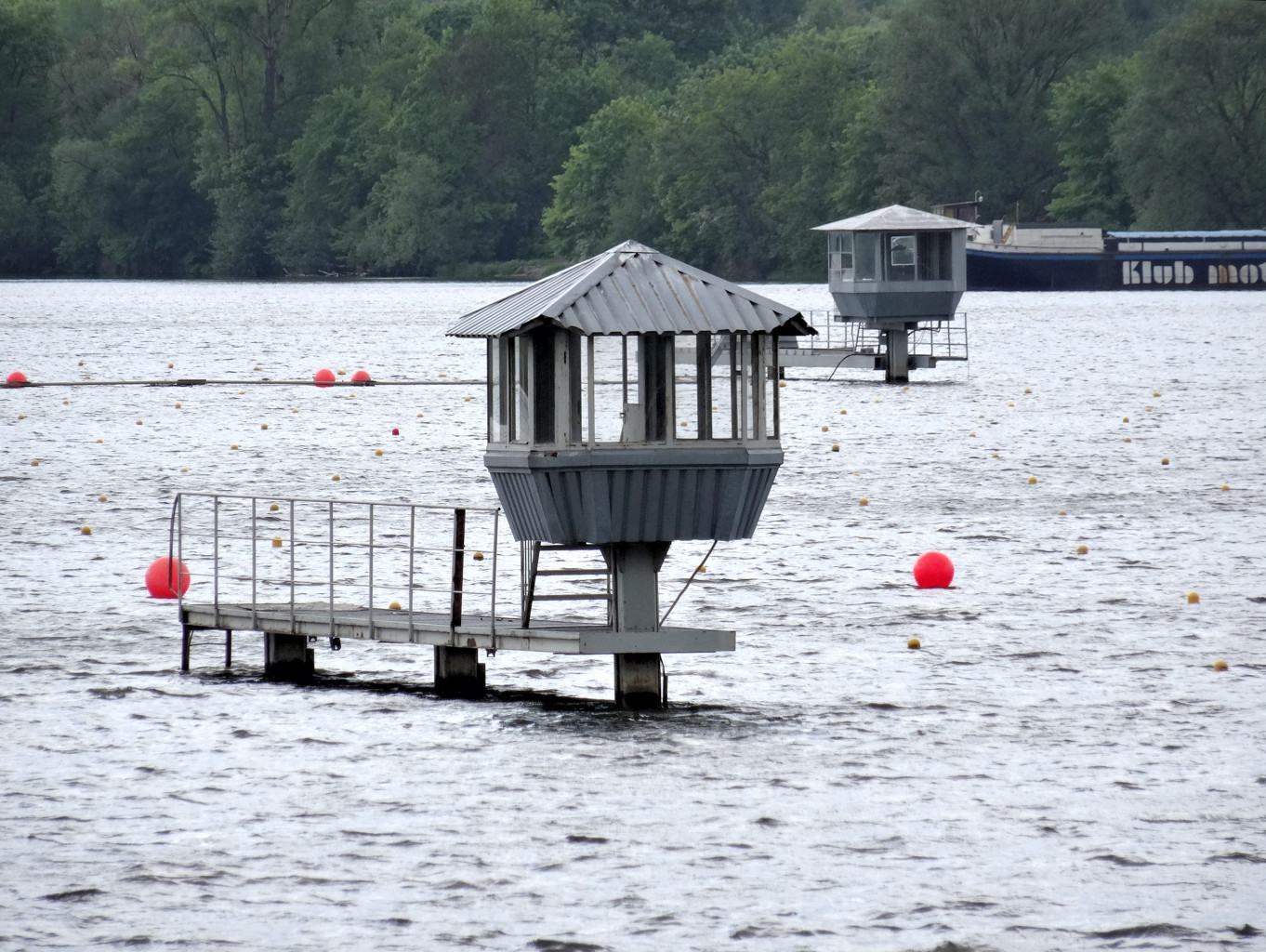 Tor regatowy w Bydgoszczy-Brdyujściu